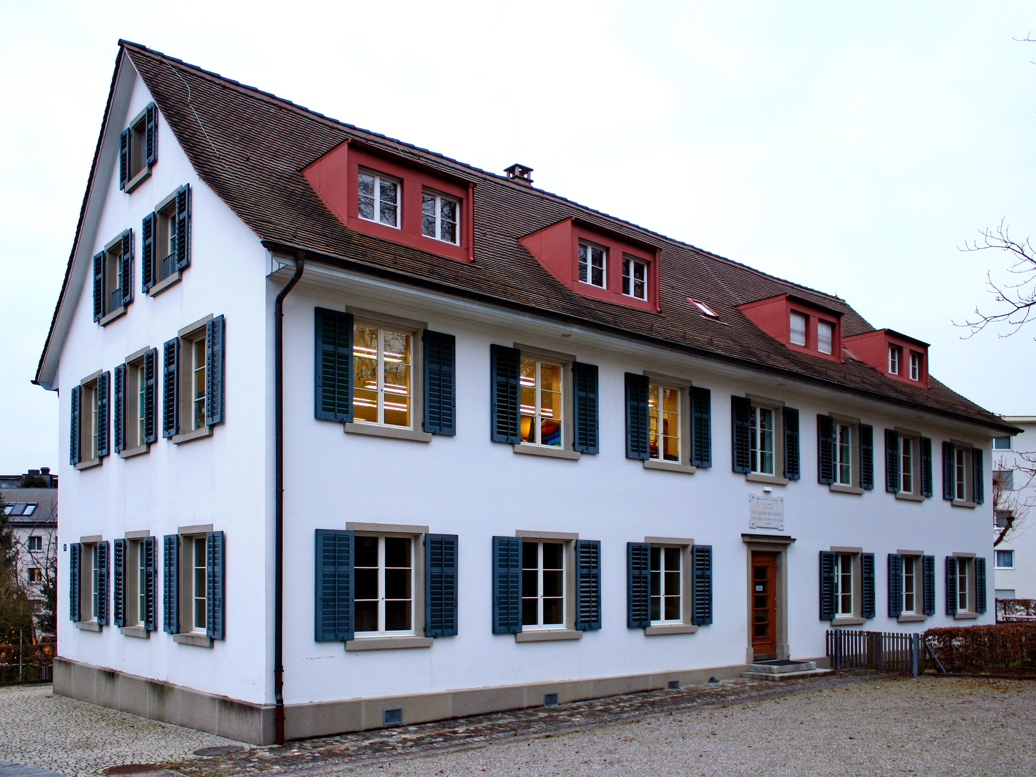 Schulhaus (Johann) Heinrich Bosshardt in Zürich-Schwamendingen (Switzerland)